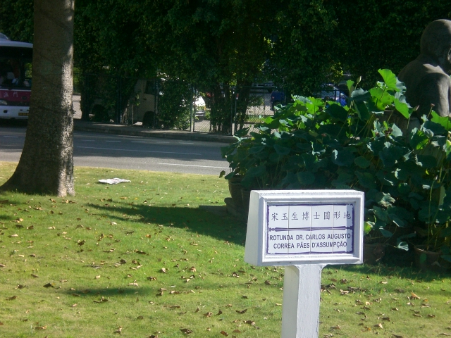 Macau Rotunda Dr Carlos D'Assumpção, 宋玉生博士圓形地 Photo author= Mo707